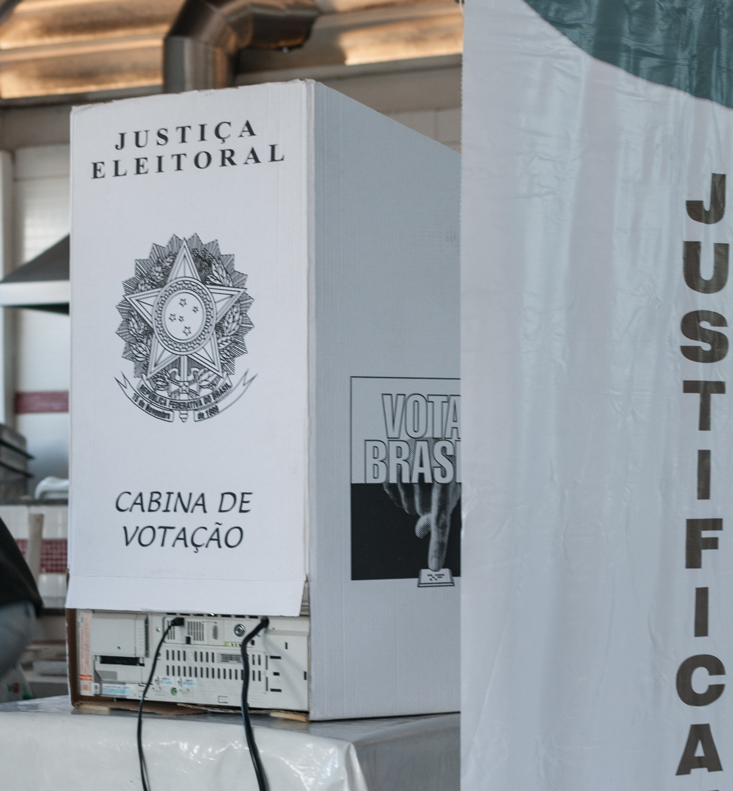 Elecciones generales de Brasil de 2014